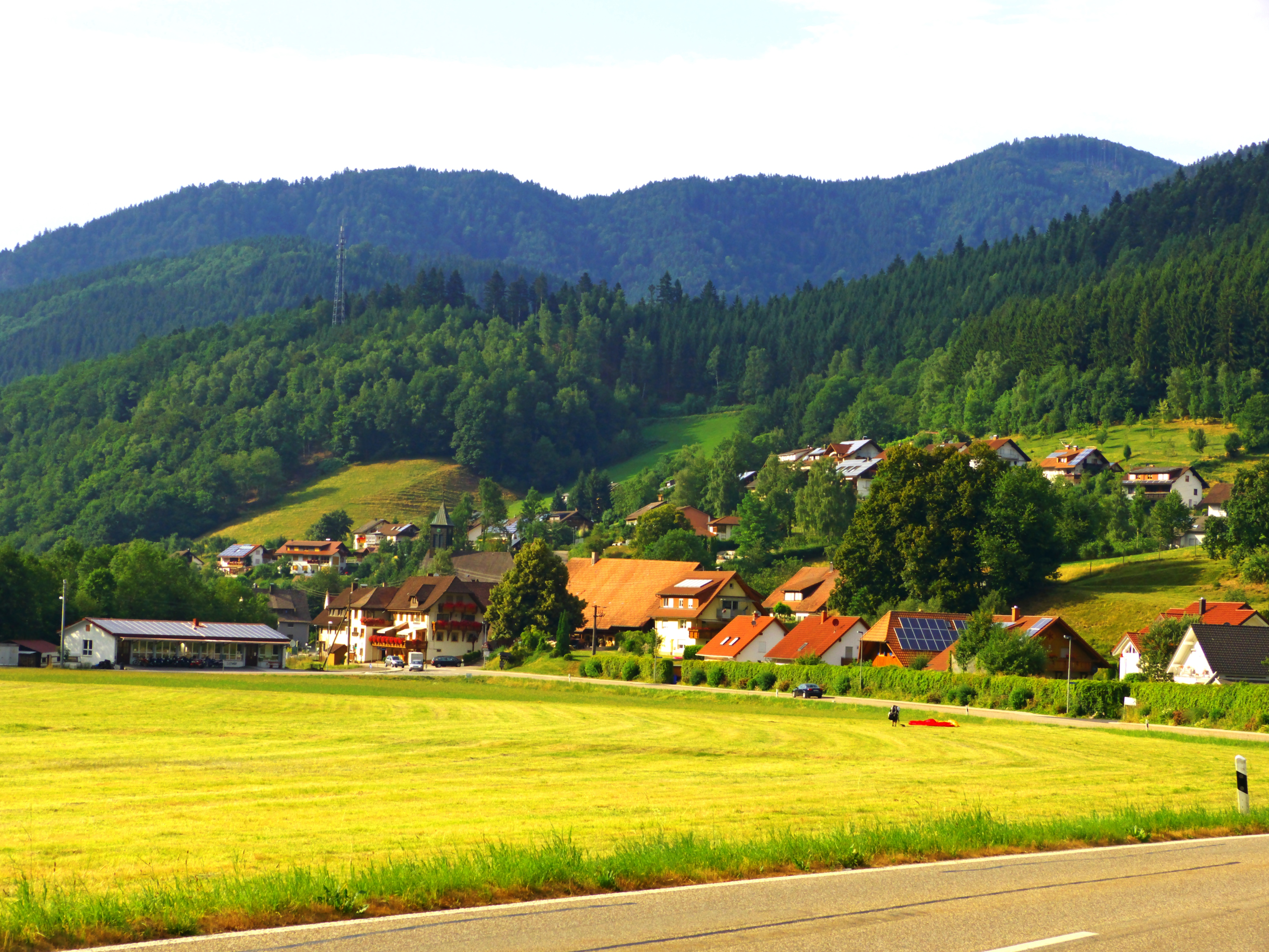 Obersimonswald